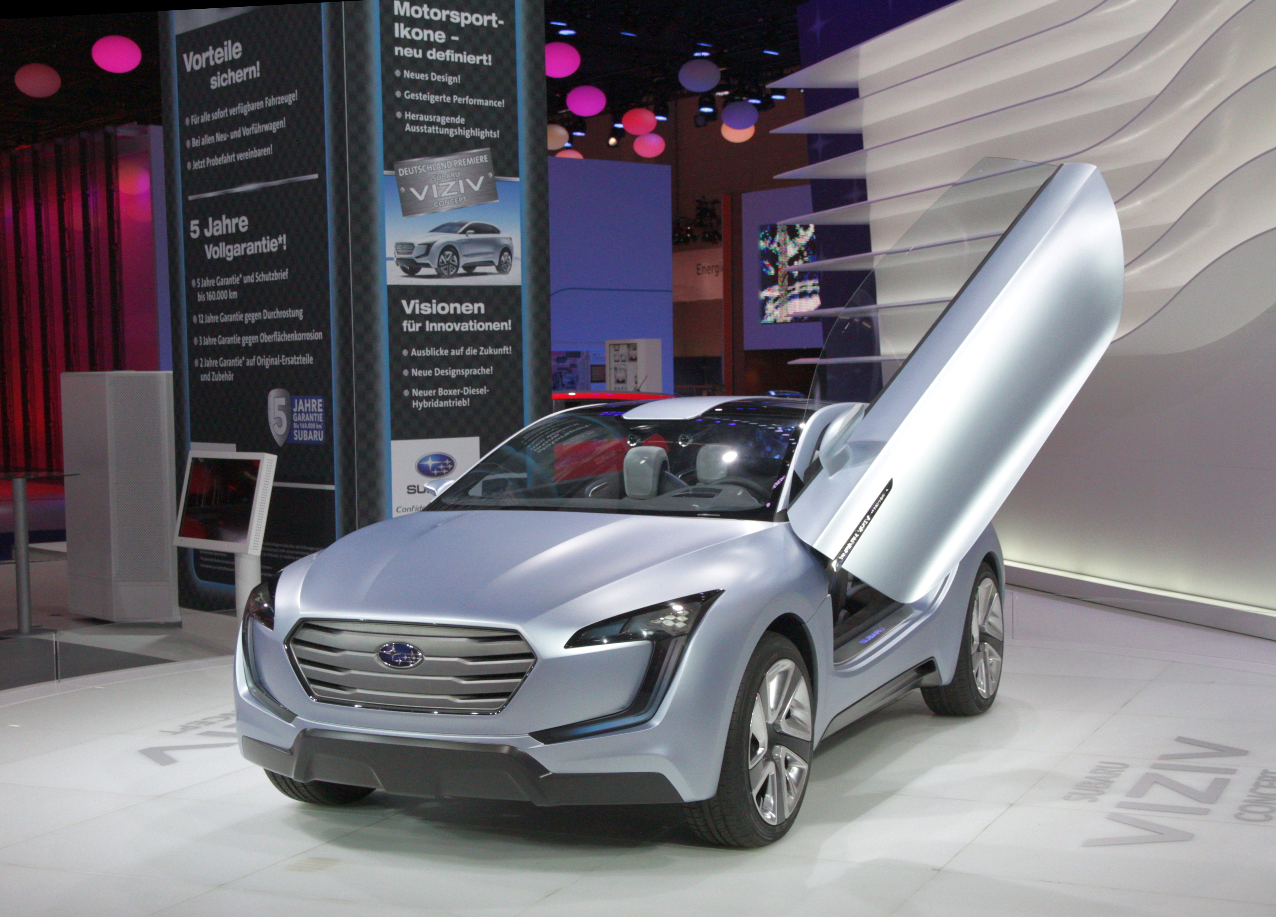 IAA 2013 Frankfurt Germany Subaru